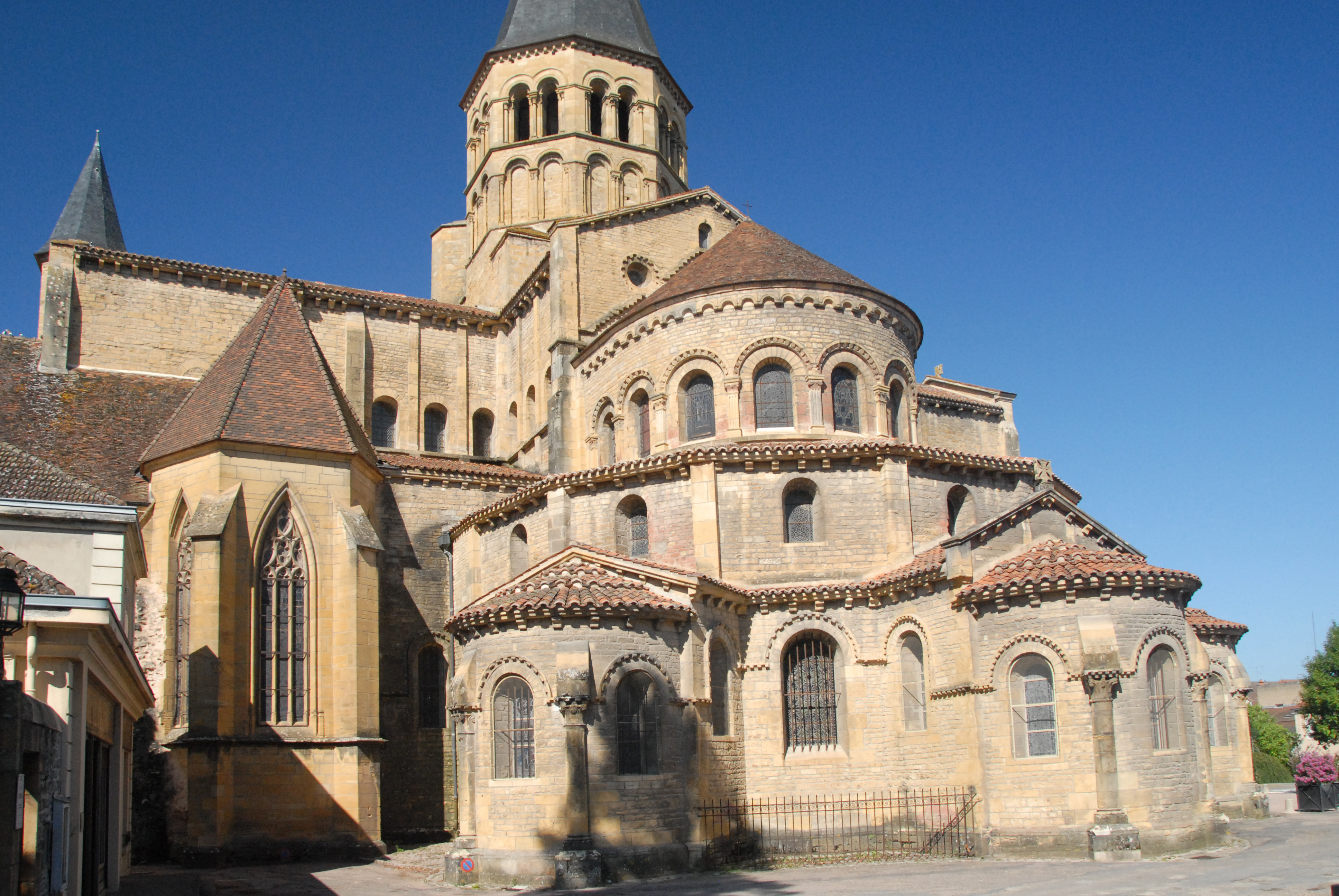 Chorhaupt u. Querhaus von SO